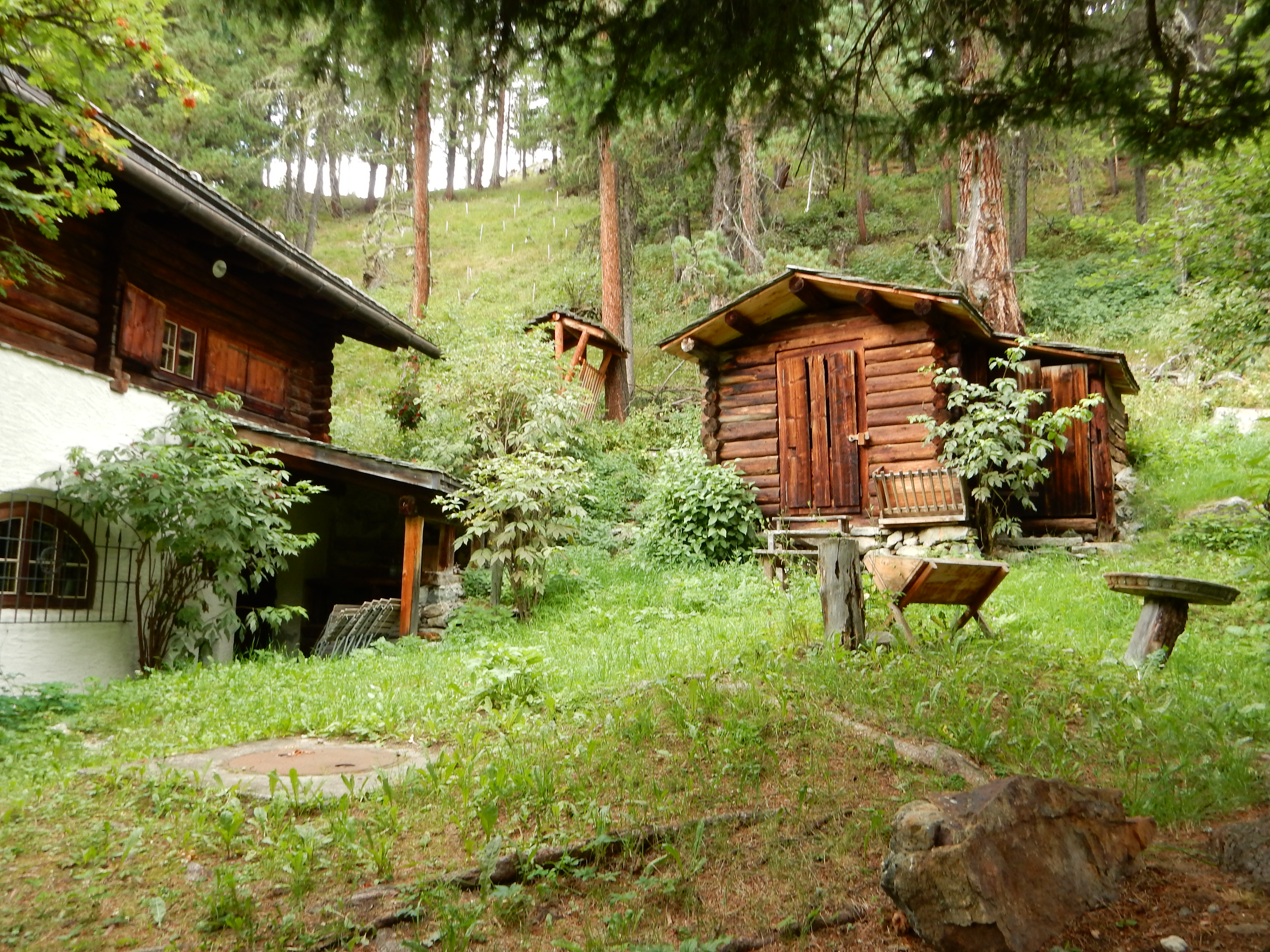 Neben dem Mili-Weber-Haus: Haus im dem die Schweizer Künstlerin Mili Weber gelebt und gewirkt hat (Gemeinde St. Moritz). Erkennbar sind Fütterungsplätze für wilde Tiere.